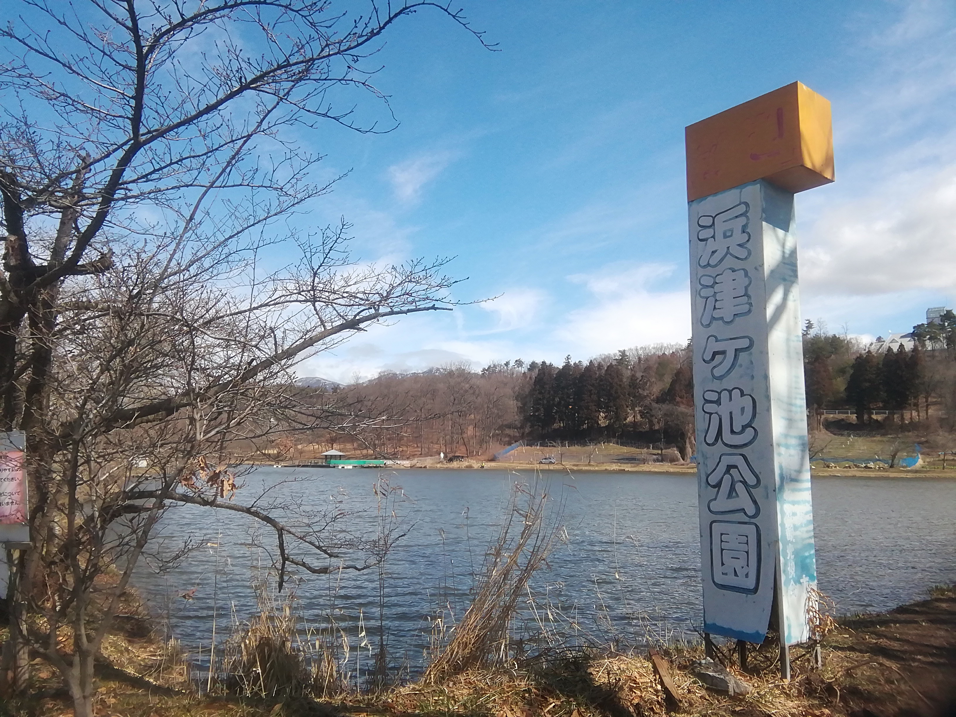 浜津ケ池公園